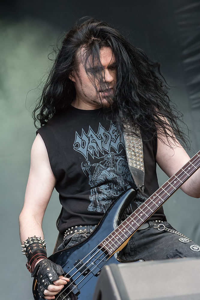 Vader - Rock Harz 2013 - 11-07-2013